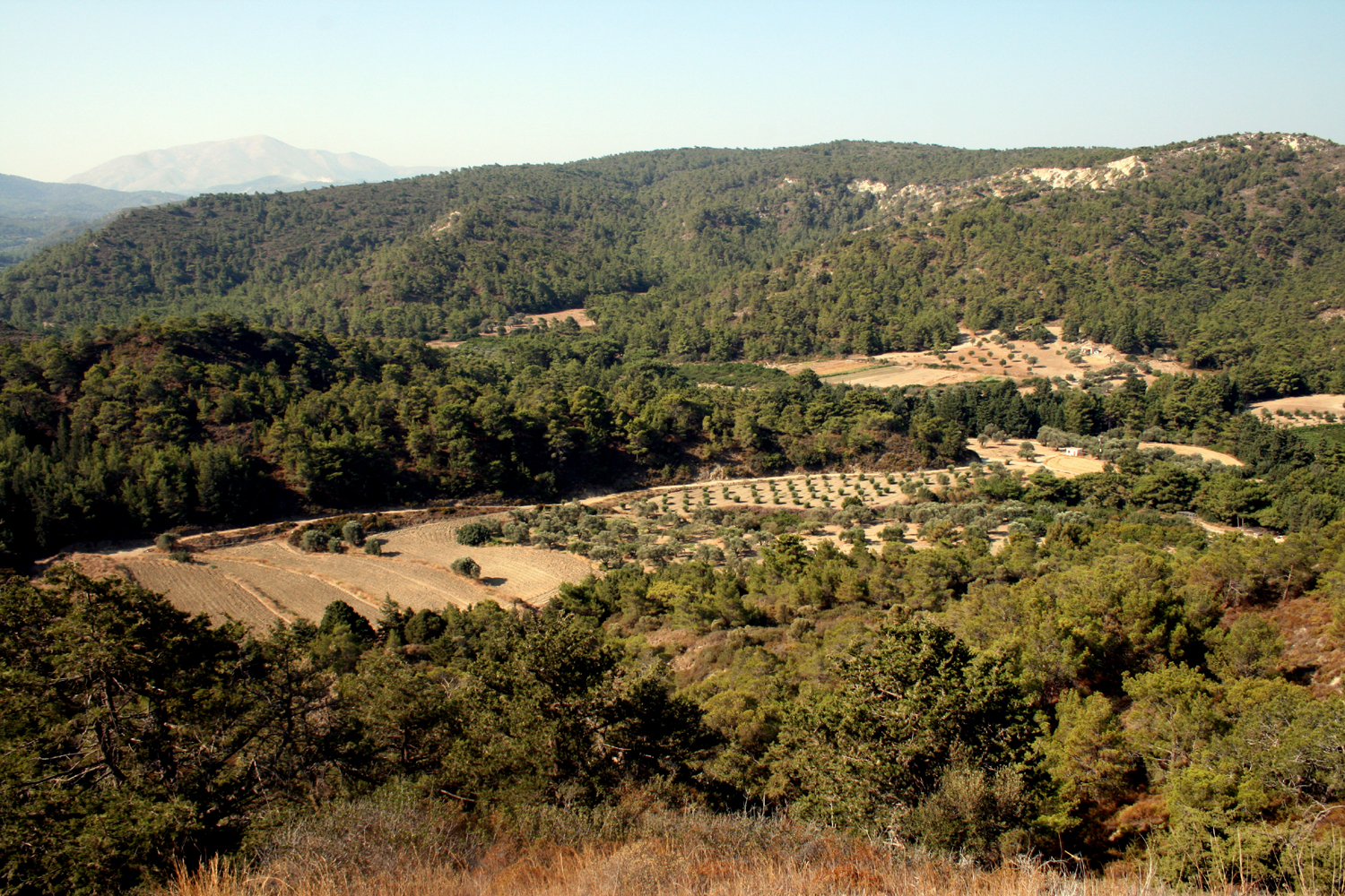 View from point of excavations of old Rhodes town Kámiros destroyed by earthquake Pohled z místa vykopávky starobylého města Kámiros zničeného zemětřesením Photo August 2007 Author= Karelj